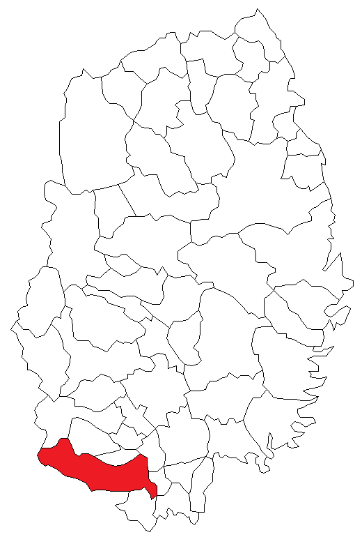 2004年当時の岩手県及び一関市の図。